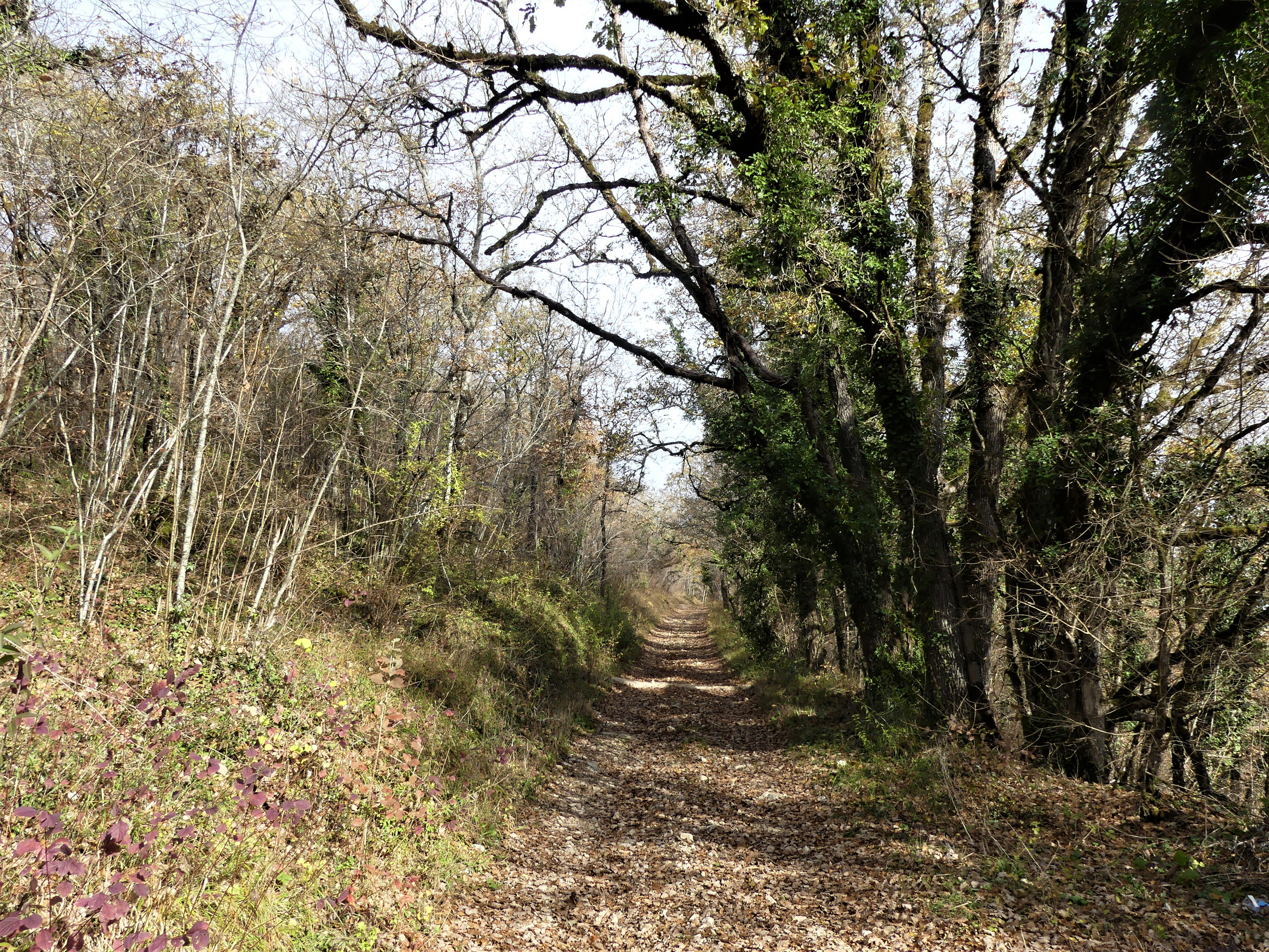 Chemin dans le causse de Terrasson au Pech de la Fourche, Saint-Amand-de-Coly, Dordogne, France.